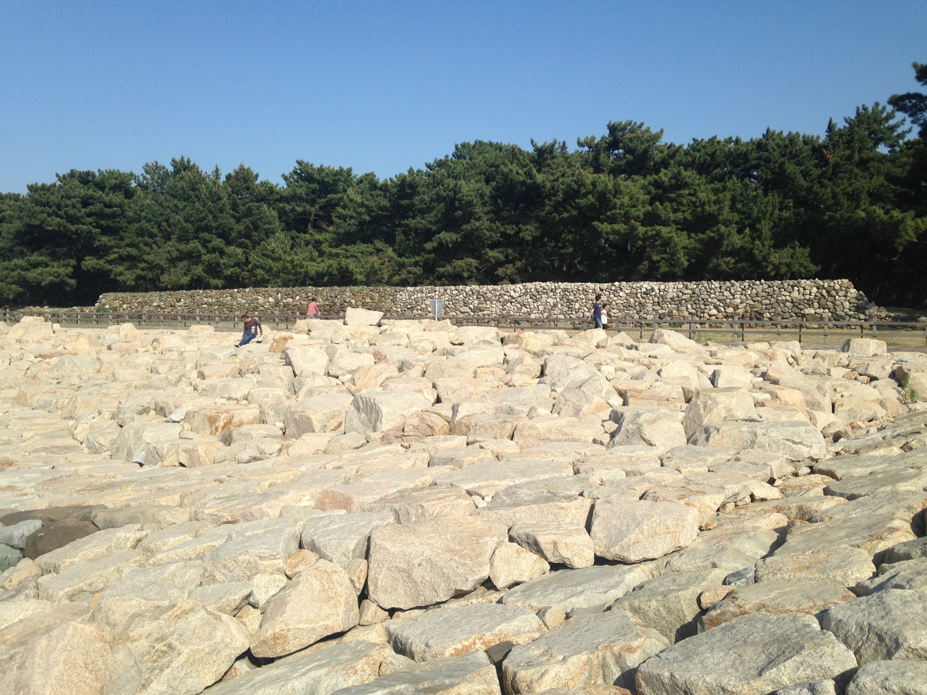 生の松原の元寇防塁